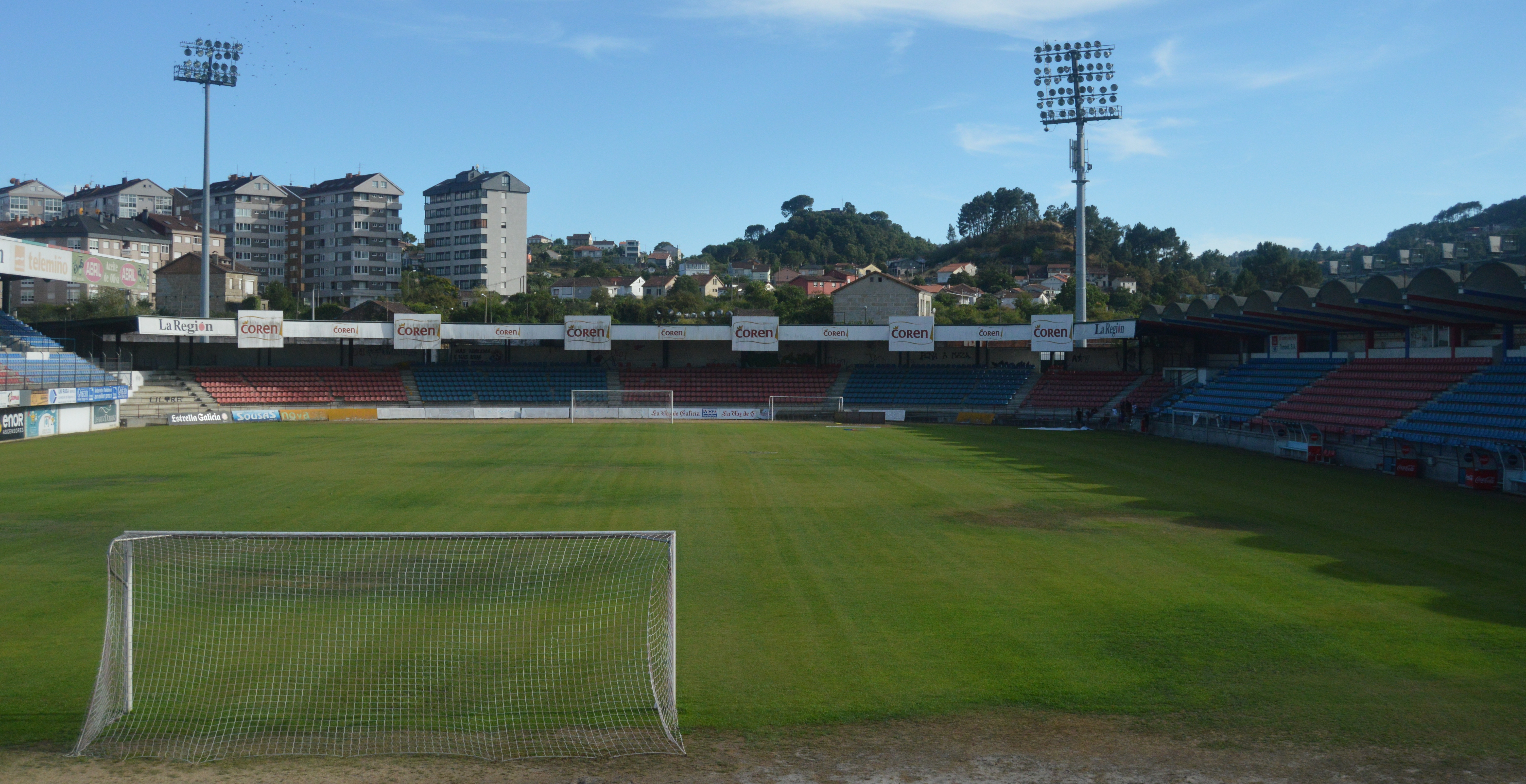 Estadio de O Couto, donde juega la UD Ourense